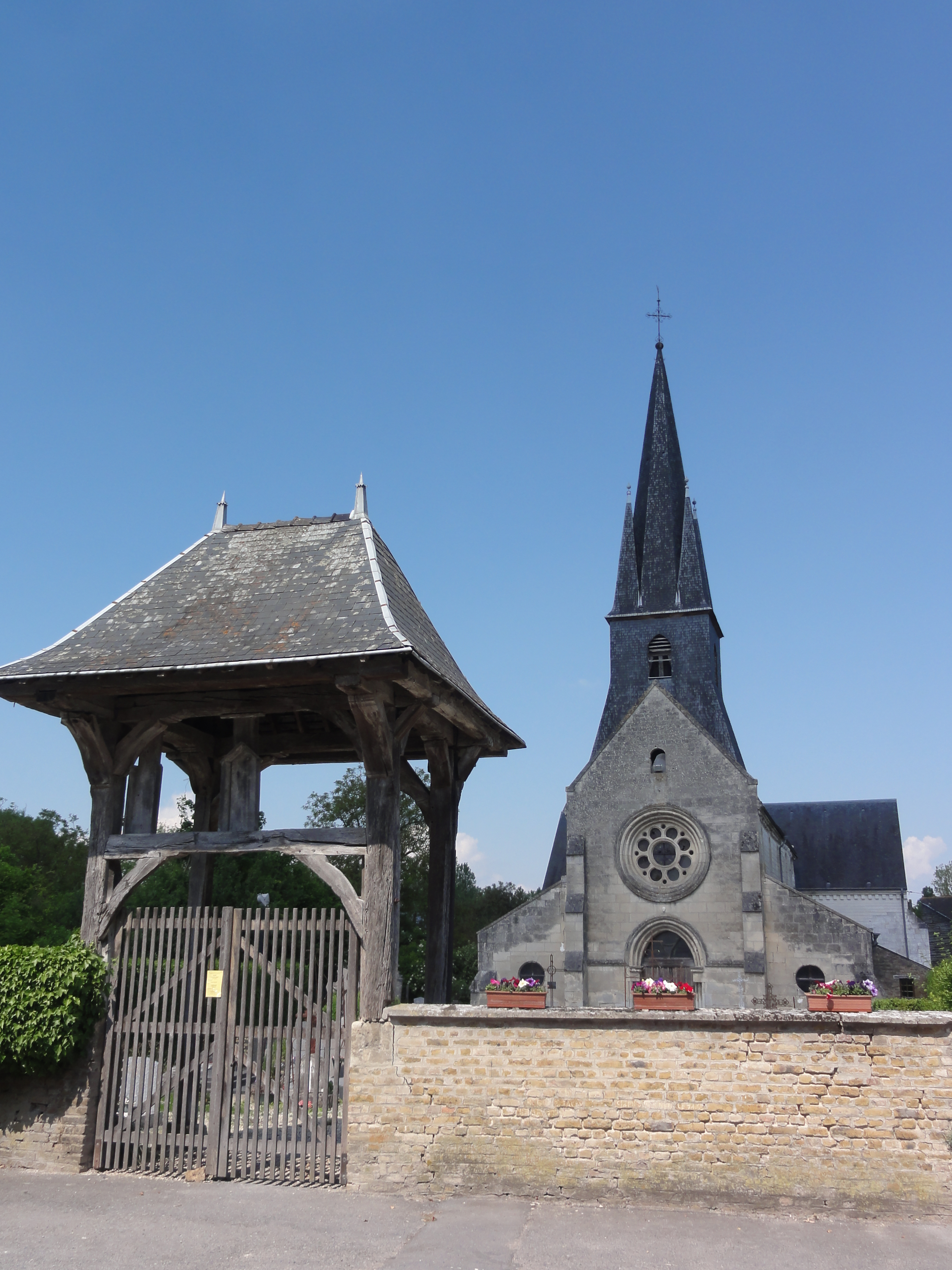 Balham (Ardennes) Église avec portail du cimetière